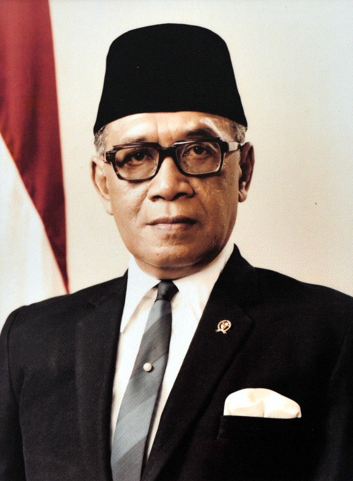 Foto Resmi Hamengkubuwana IX sebagai Wakil Presiden Indonesia